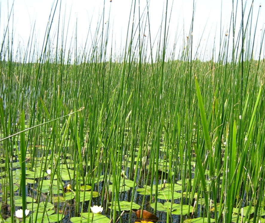 Scirpetum lacustris in Woszczelskie Lake, Poland.